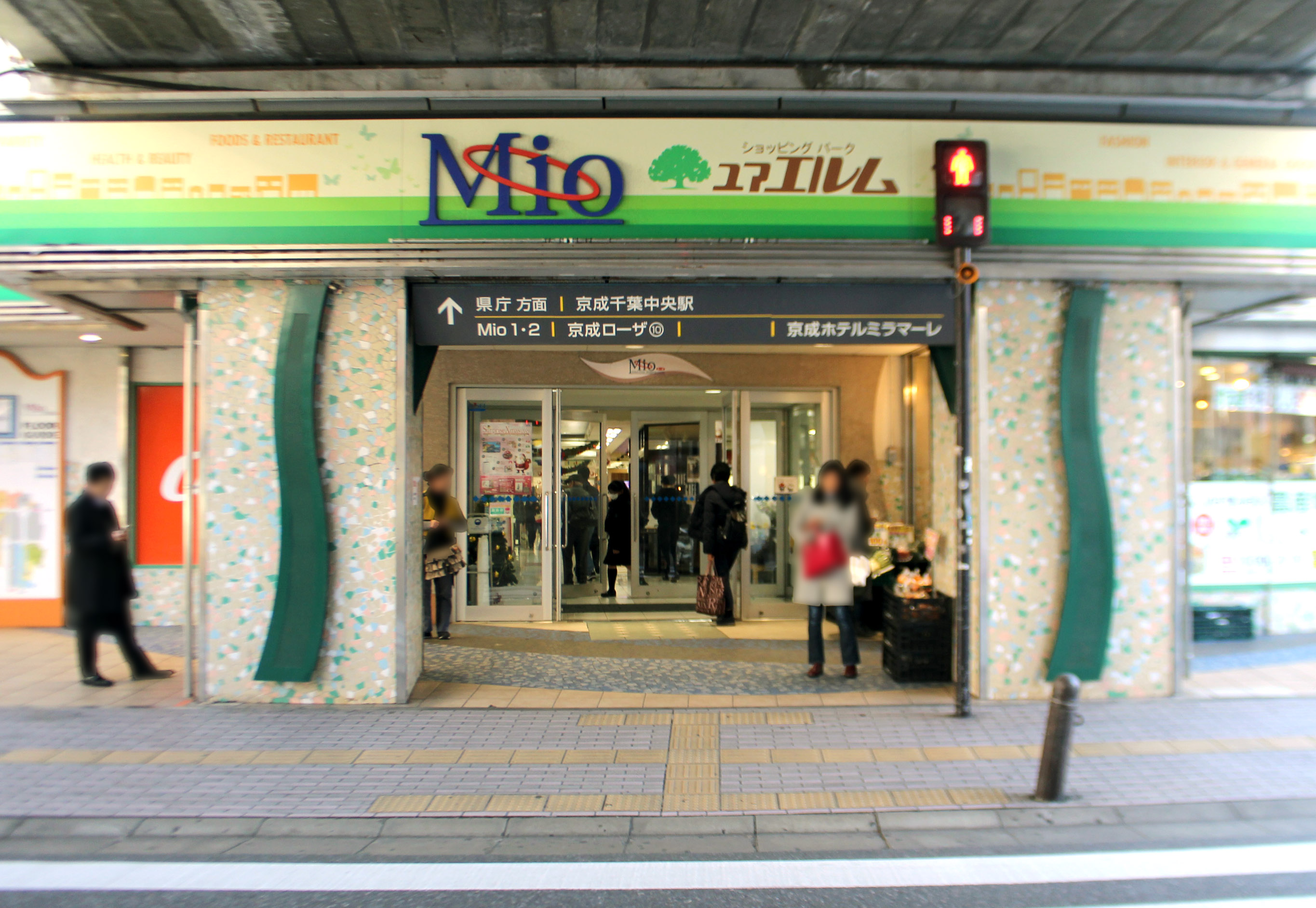 ミーオ1 千葉駅から千葉中央駅に接続する入口